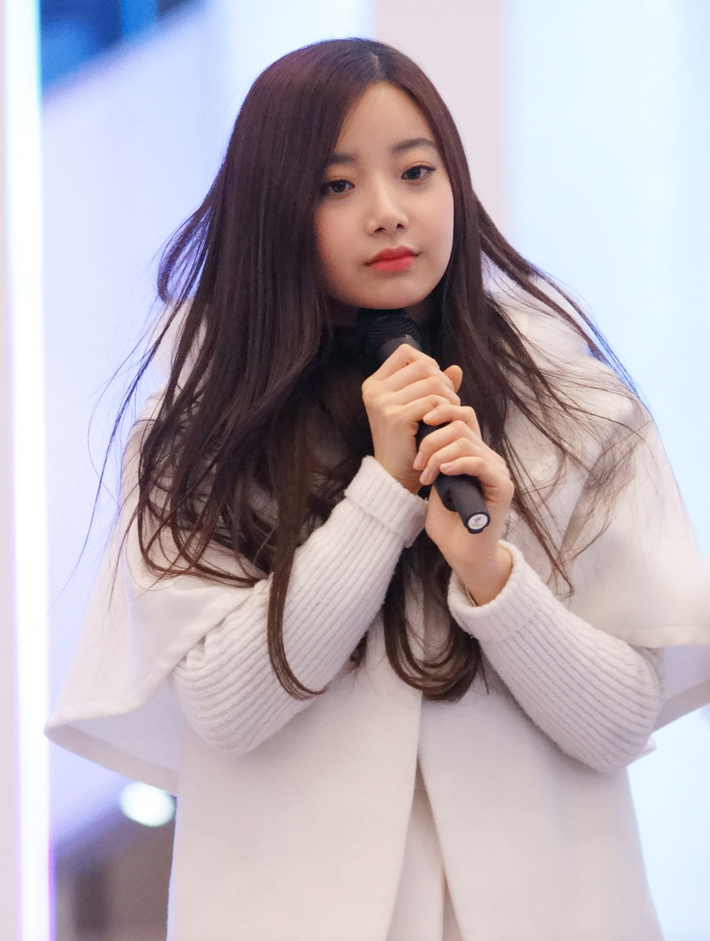 20160124 에이프릴 부산 게릴라 공연2